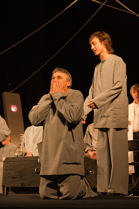 Спектакль